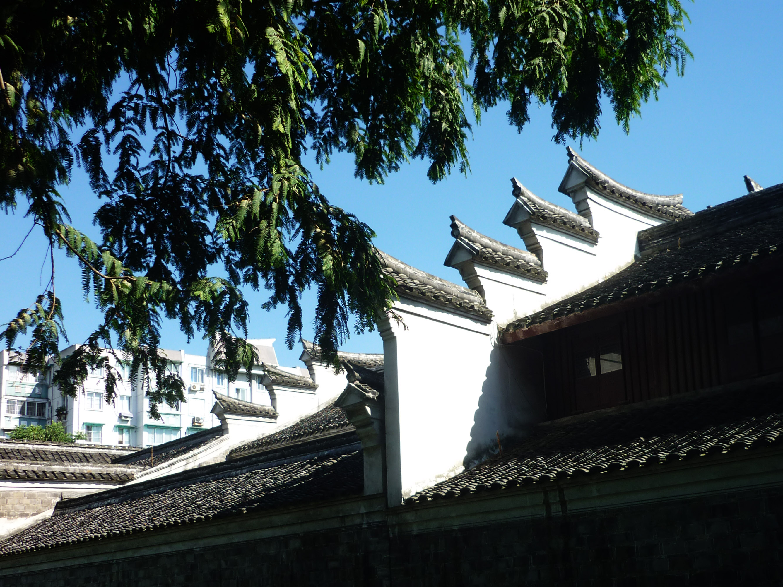 宁波月湖银台第